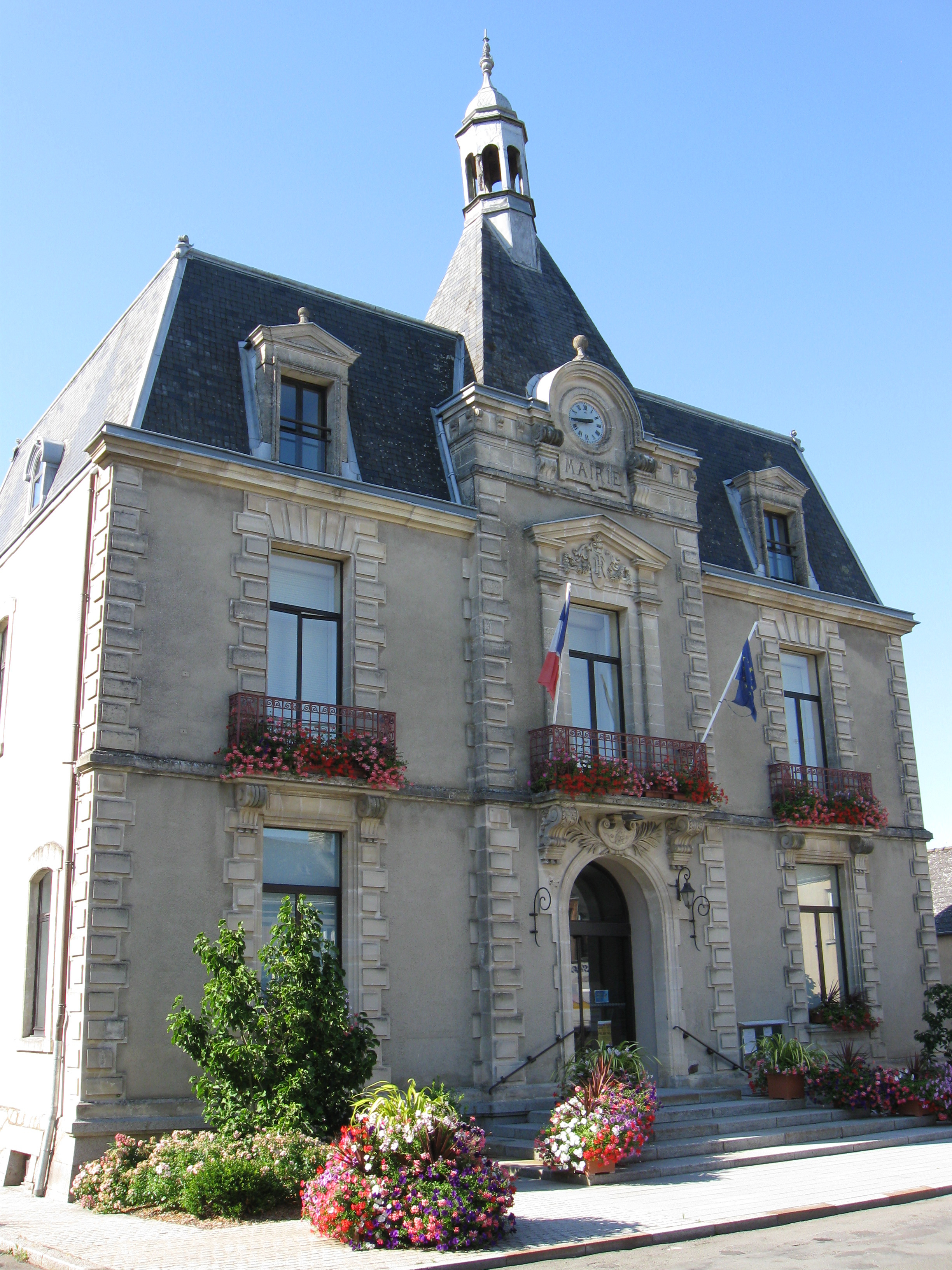 Mairie de Pré-en-Pail (département de la Mayenne, région Pays de la Loire).